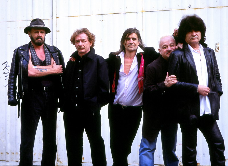 A Piramis együttes tagjai (balról jobbra: Som Lajos, Gallai Péter, Révész Sándor, Köves Miklós, Závodi János), Budapest